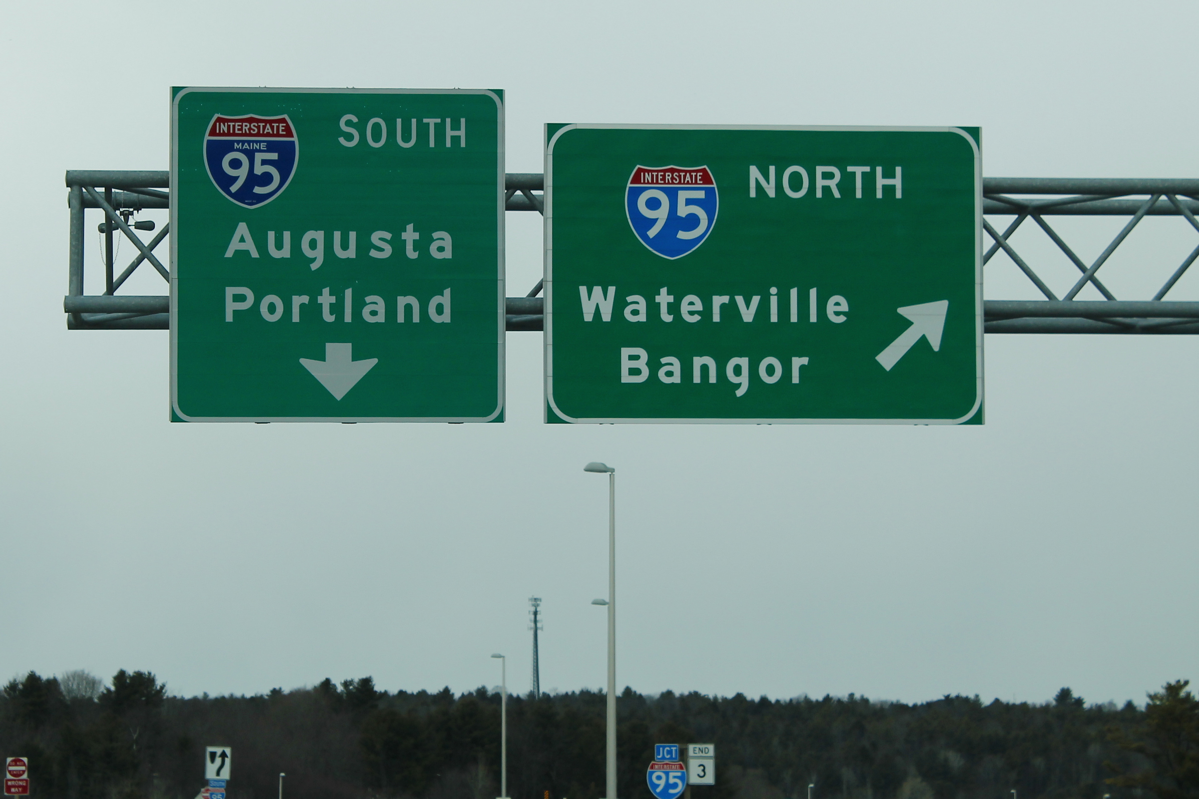 ME3endInt95nsSigns